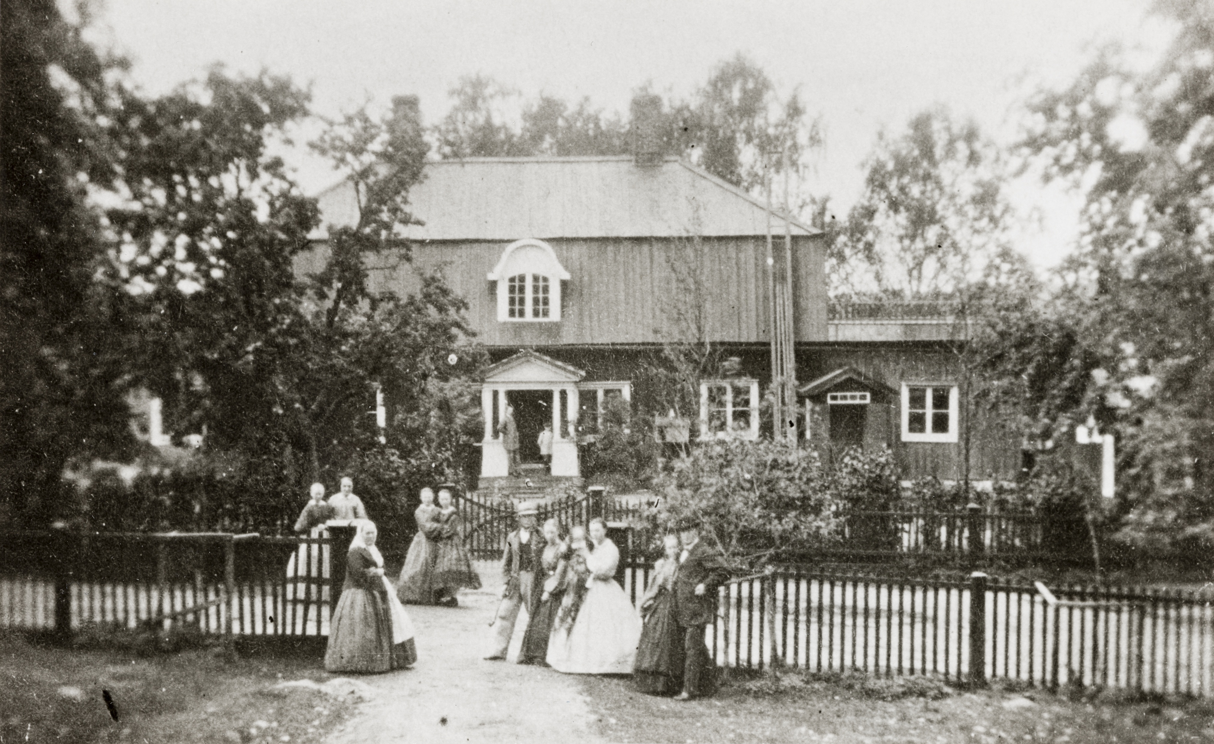 Kärkelän kartano Karjalohjalla.